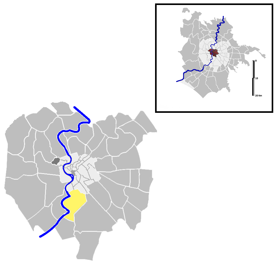 Ostiense